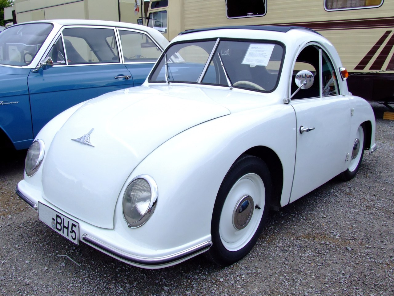 Quelle: selbst fotografiert, 07/2007 Fotograf: Späth Chr.